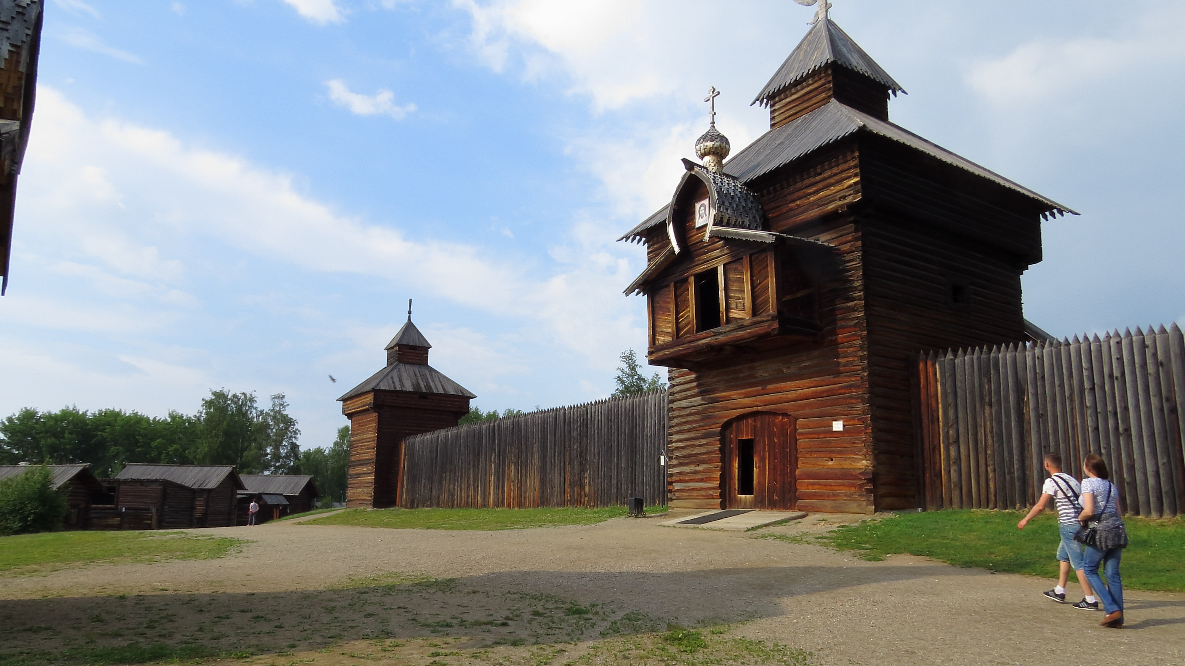 Музей деревянного зодчества: в 18 км от истока р. Ангара, на правом берегу, близ п. Тальцы,Иркутский район, Иркутская область This image is related to the protected area of Russia number 3810105